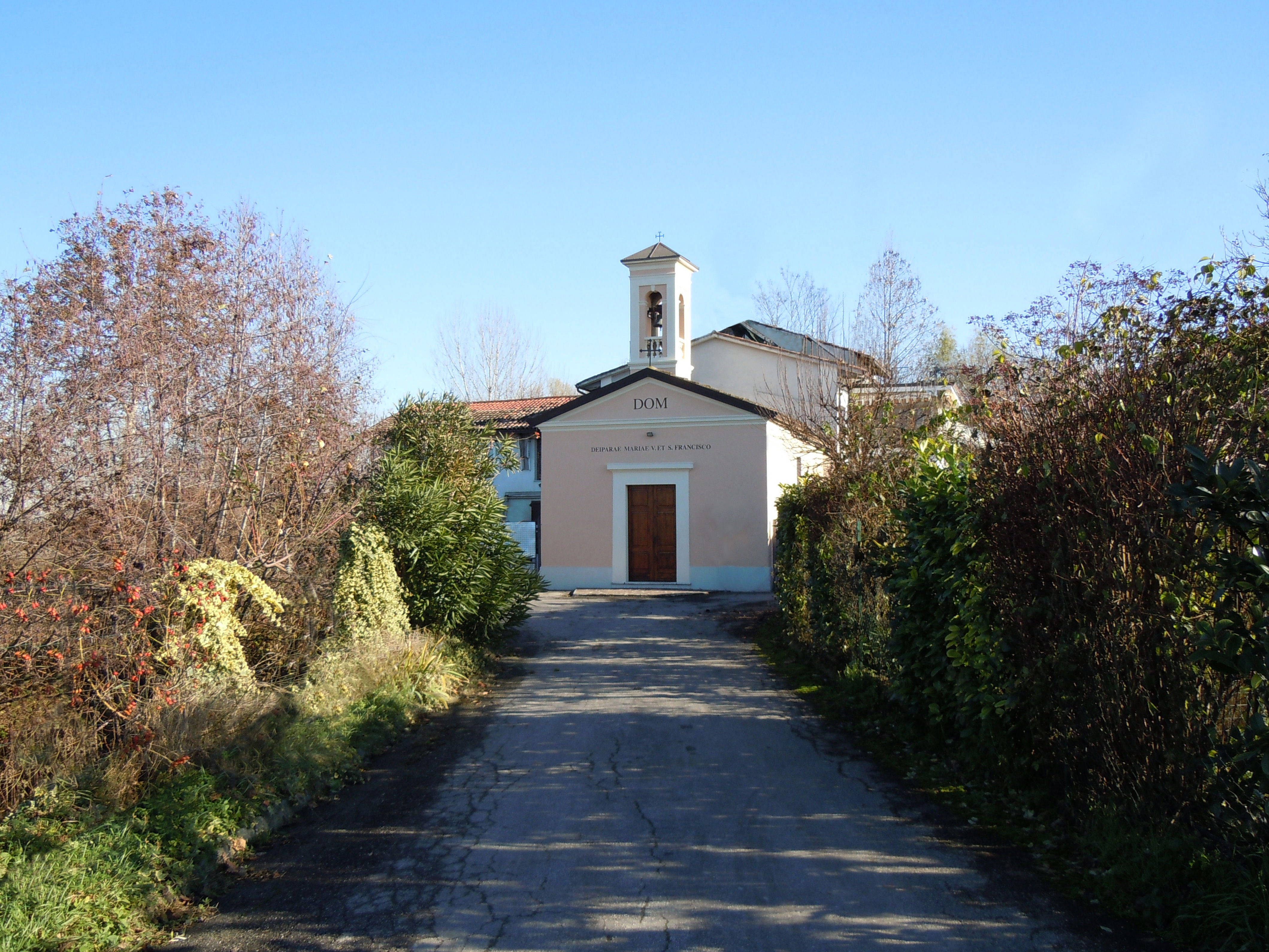 Castel Goffredo, frazione Perosso, Oratorio di San Francesco d'Assisi, del 1730.